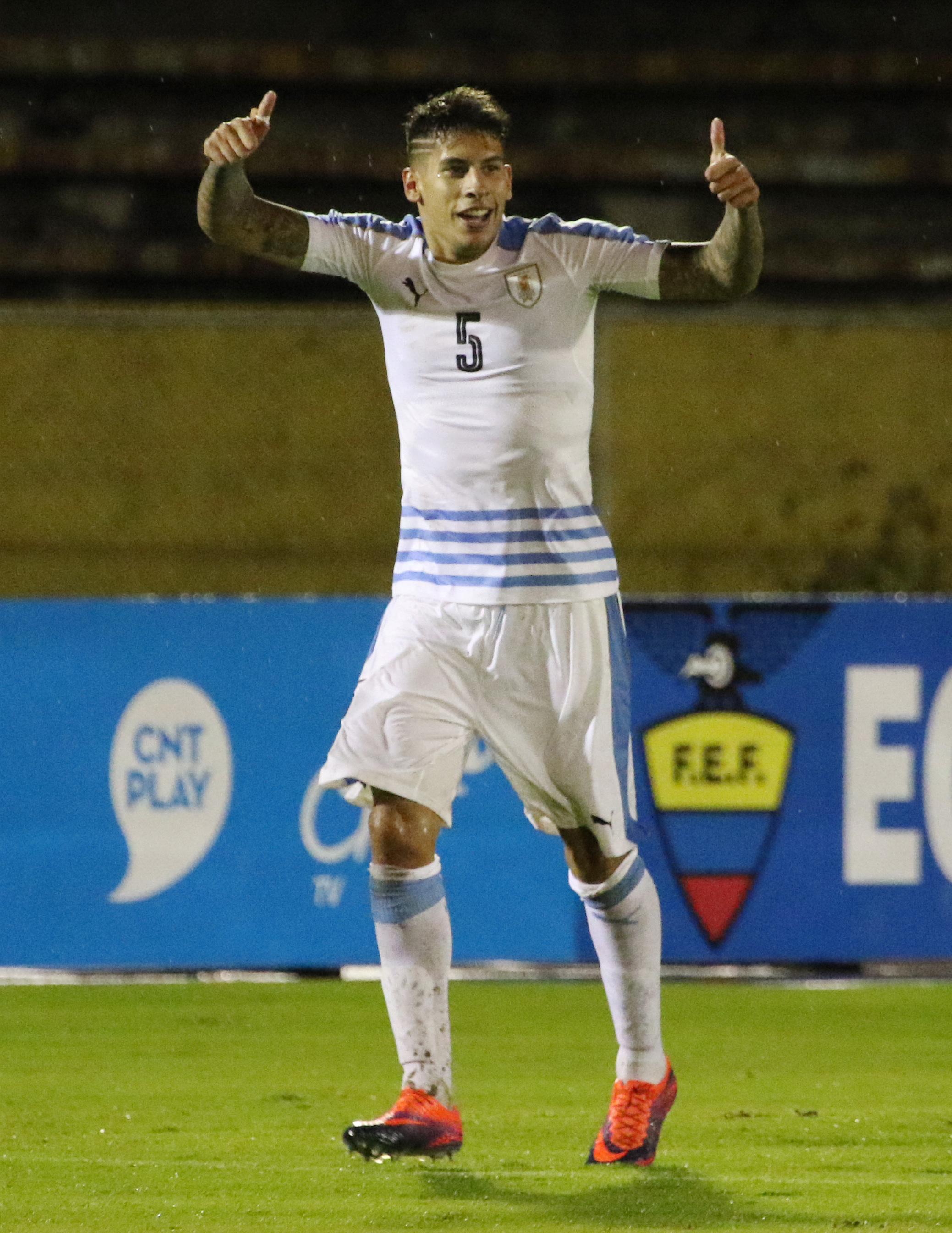 ARGENTINA URUGUAY 7 MAV